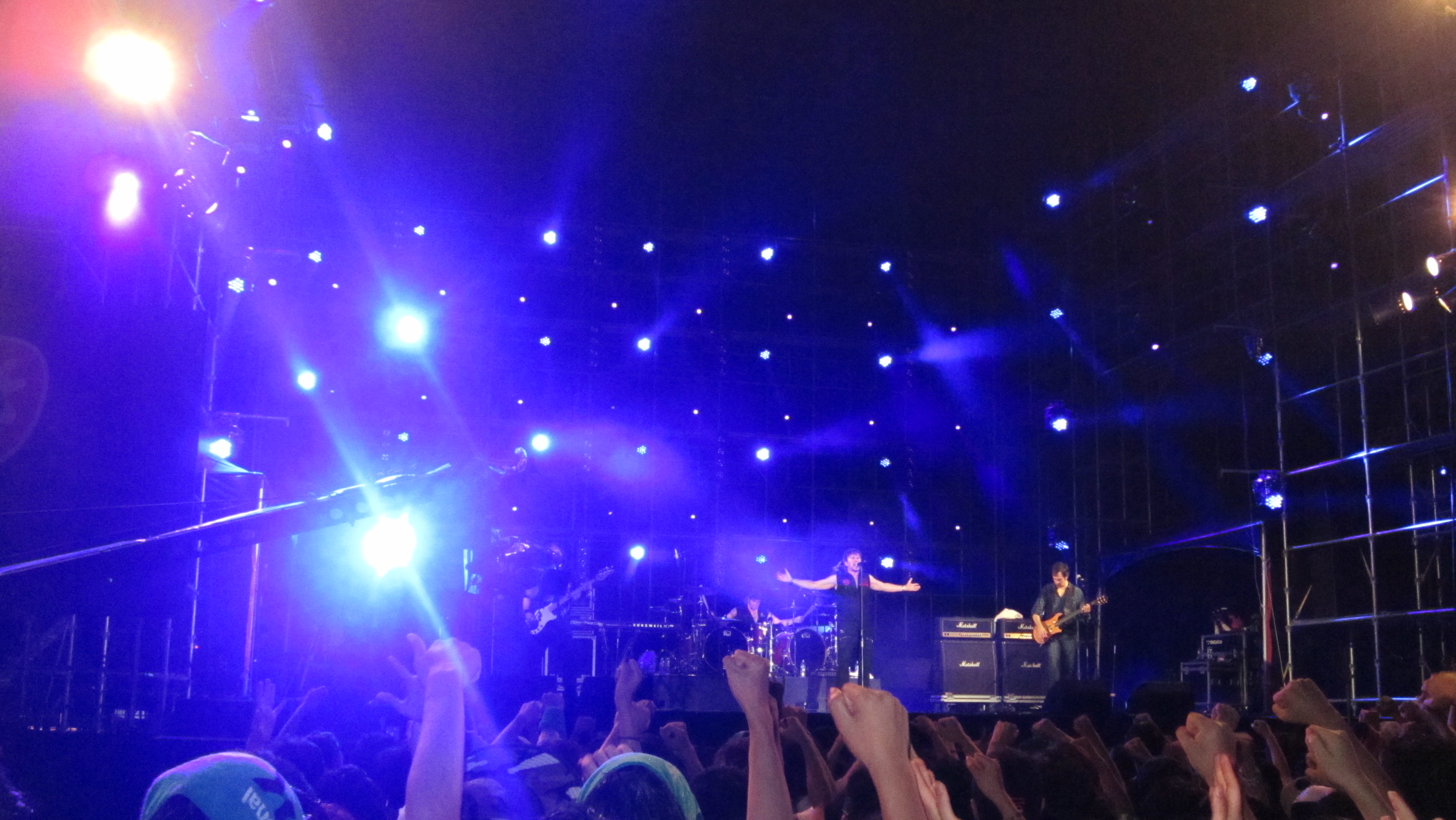 파이어하우스